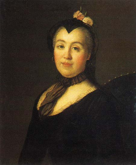 Храповицкая Елена Михайловна, урожд. Сердюкова, по преданию дочь Петра I, вторая жена сержанта В.И.Храповицкого; мать сенатора, статс-секретарь Екатерины II - А.В.Храповицкого (1749-1801).